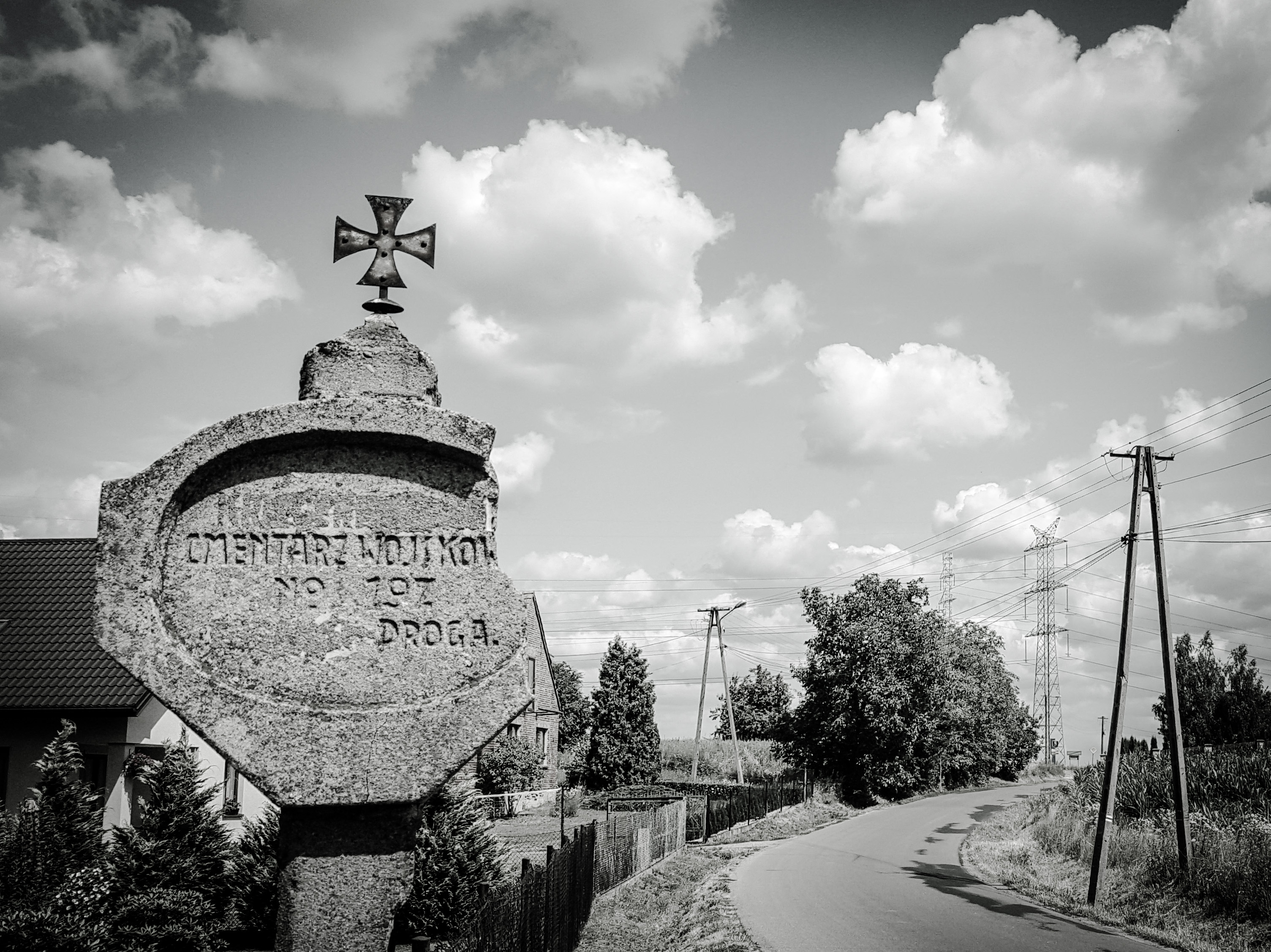 Szczepanowice. Znak wskazujący drogę na cmentarz wojenny nr 197 z okresu I wojny światowej